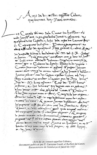 Carta dels Consellers de Barcelona a Ferran II avisant d'un corsari anomenat Colom